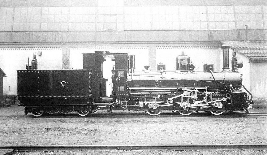 BHStB IIIa5 301 Werkfoto